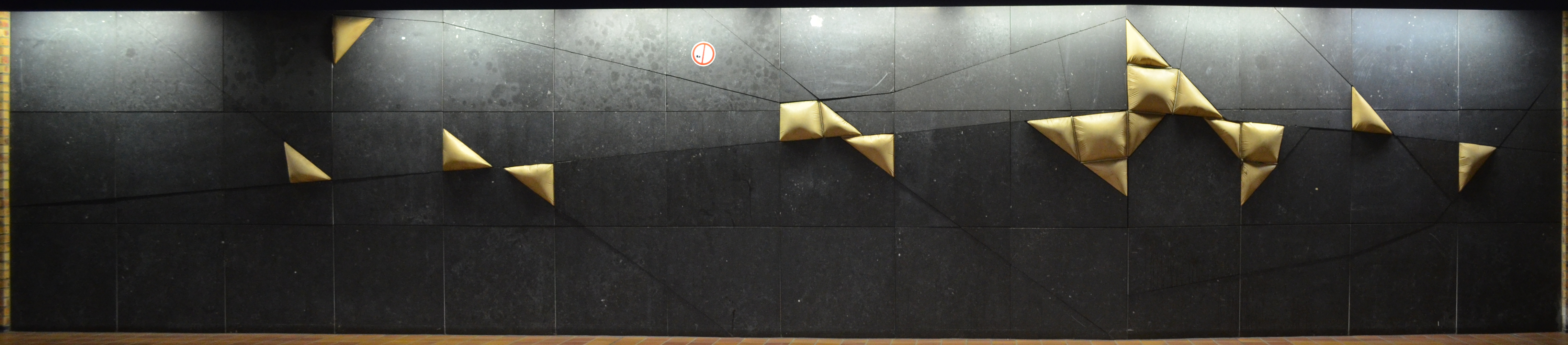 Marc Feulien - œuvre réalisée pour la station Waterloo du métro léger de Charleroi (Belgique).